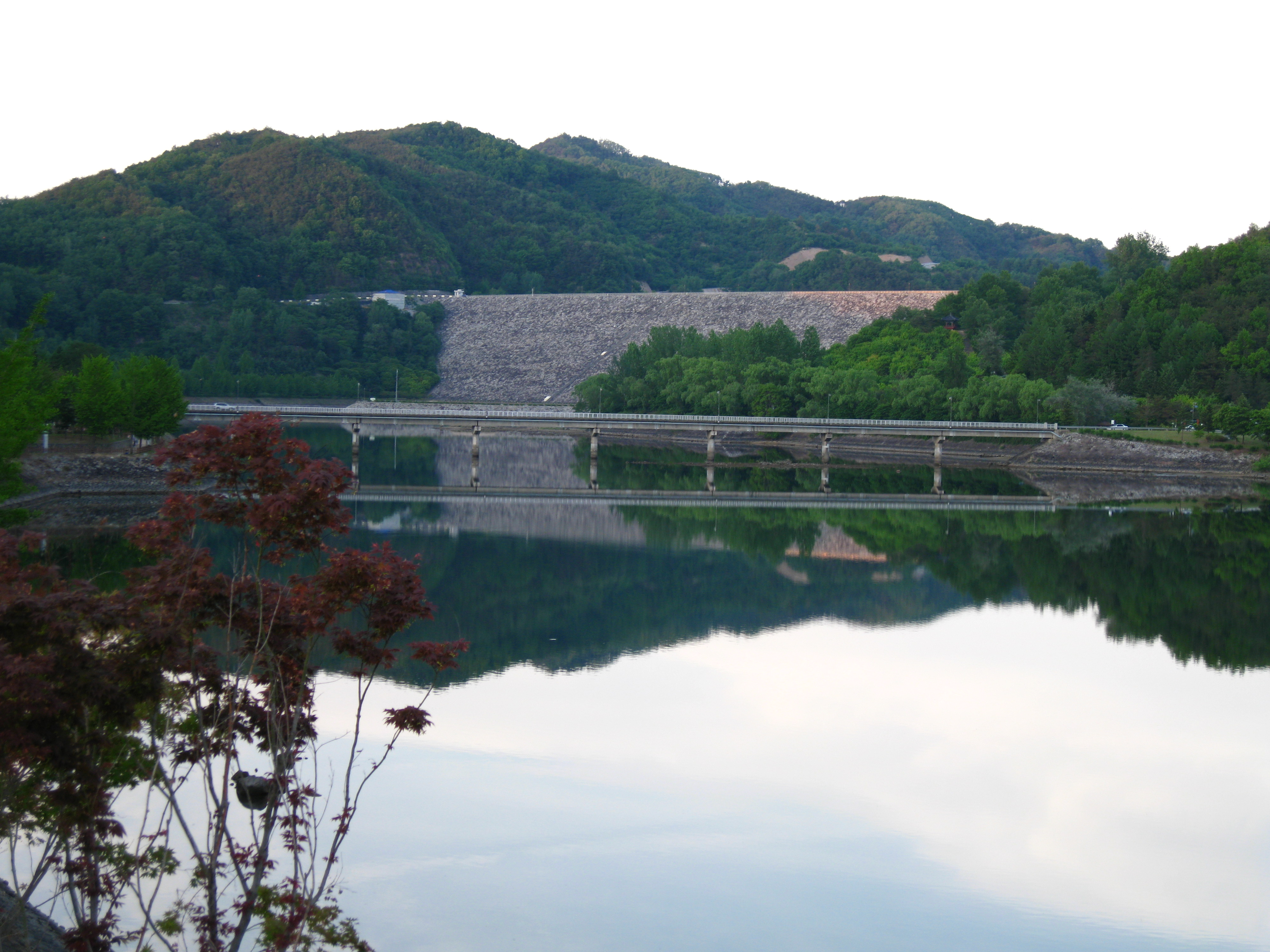 Andong Dam over Nakdong River